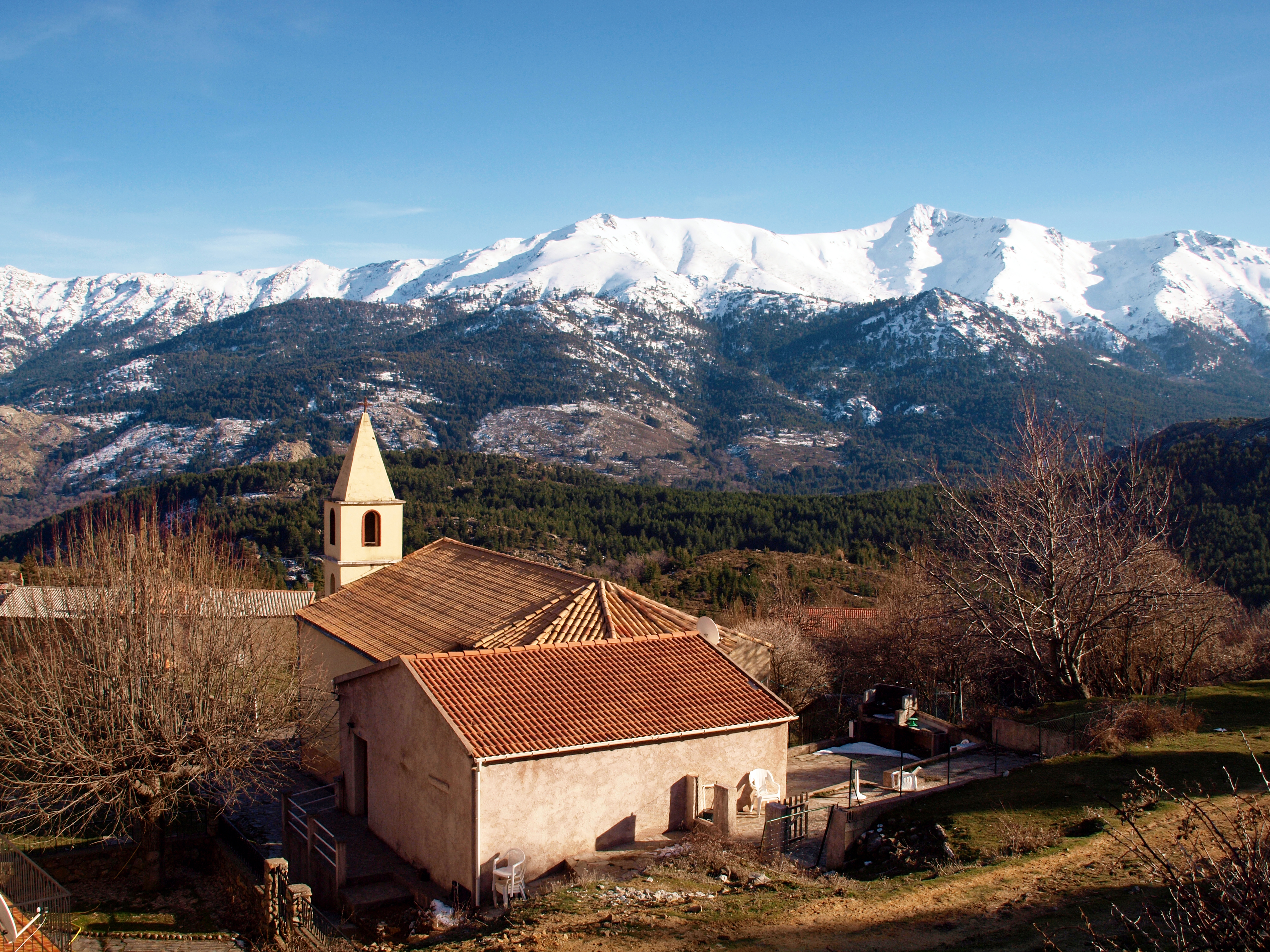 Albertacce (Corsica) - L'église Saint-Nicolas de Calasima avec, en fond, la Punta Artica (2327 m)